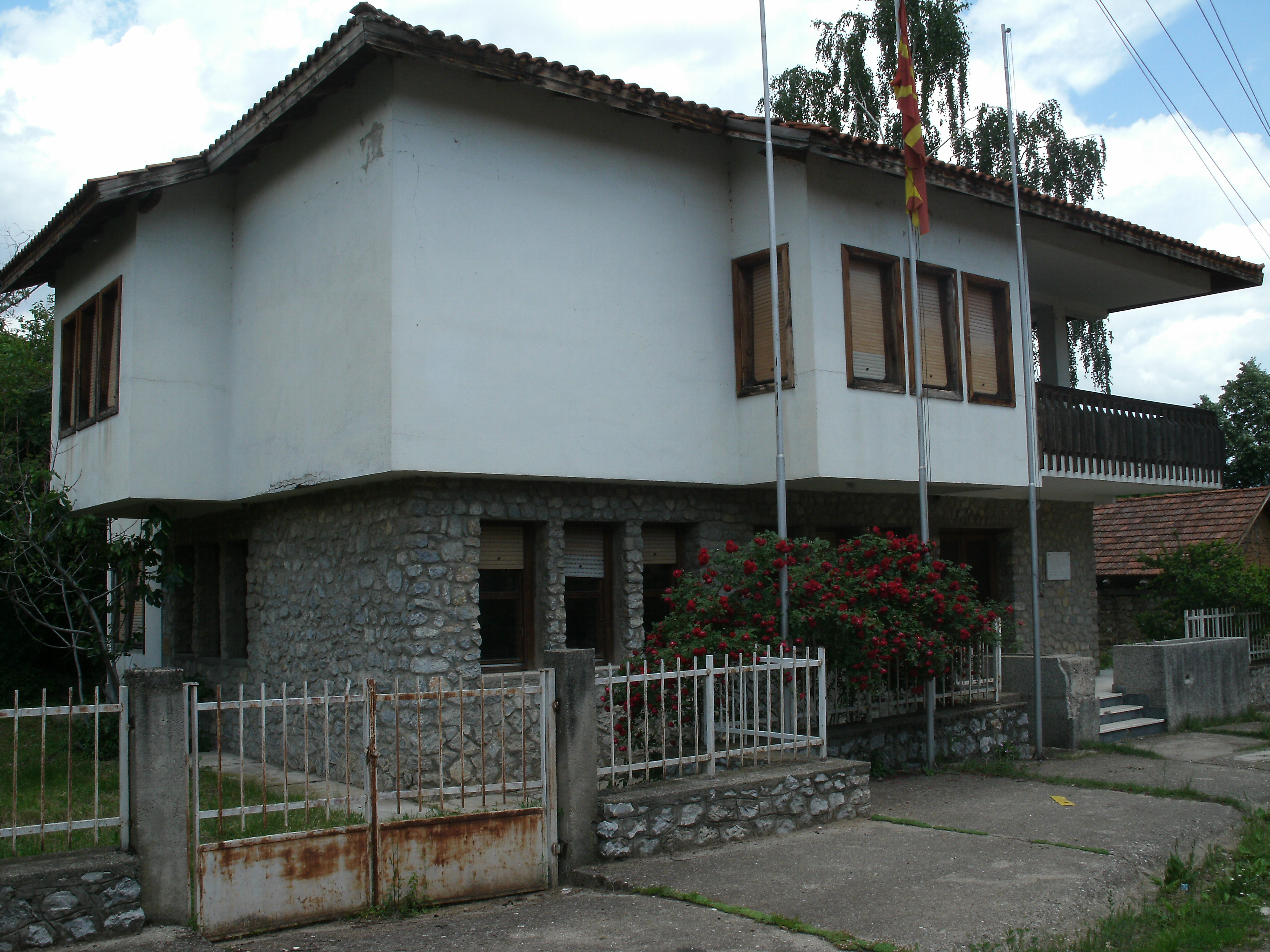 Куќата на Петар Поп Арсов во Богомила